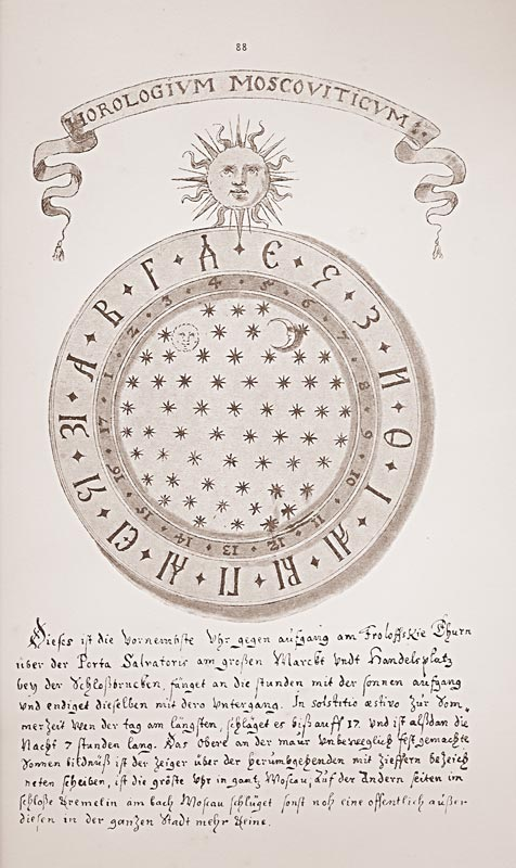 Часы на Спасских воротах